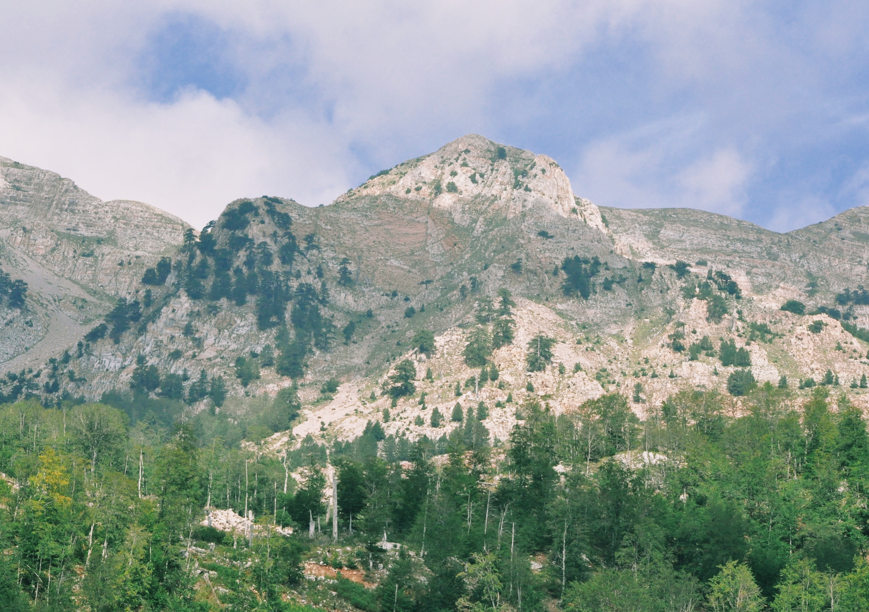 Mirditë District, Albania